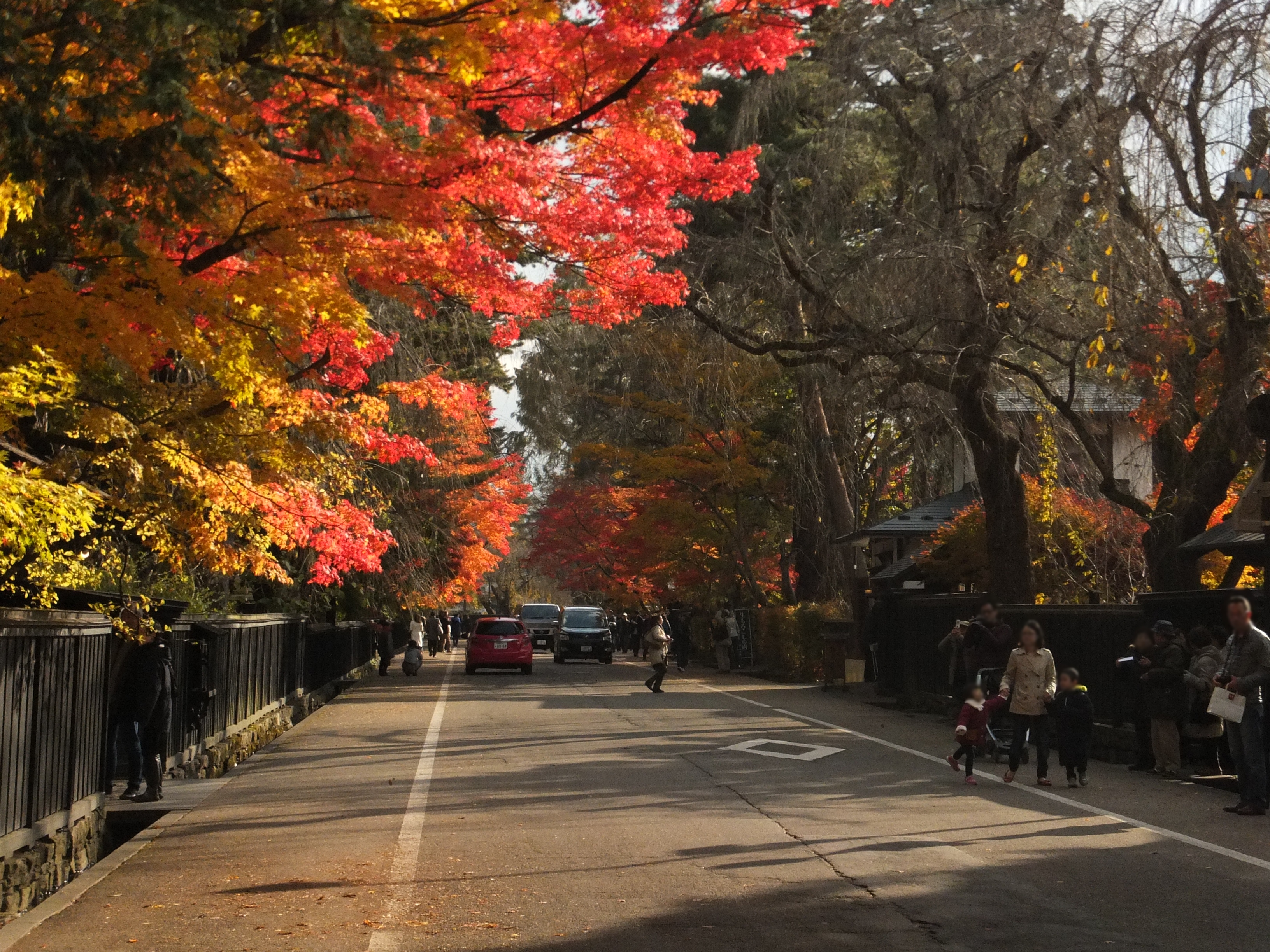 晩秋、紅葉の武家屋敷通り（秋田県仙北市角館）